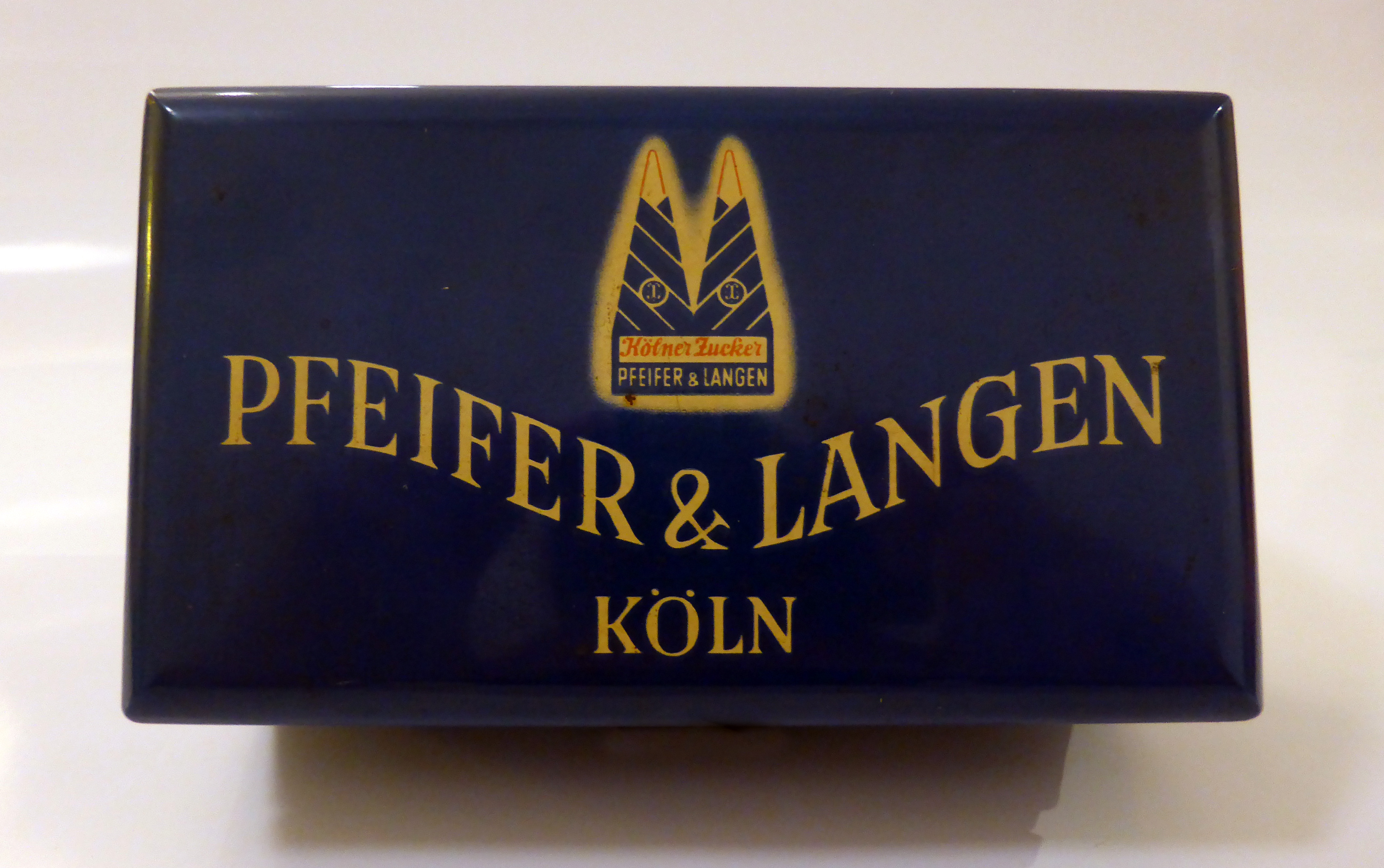 Historische Blechdose von Pfeifer & Langen.